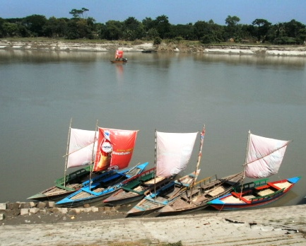 নৌকার পাল বিজ্ঞাপনের মাধ্যম হিসাবে ব্যবহৃত হচ্ছে।